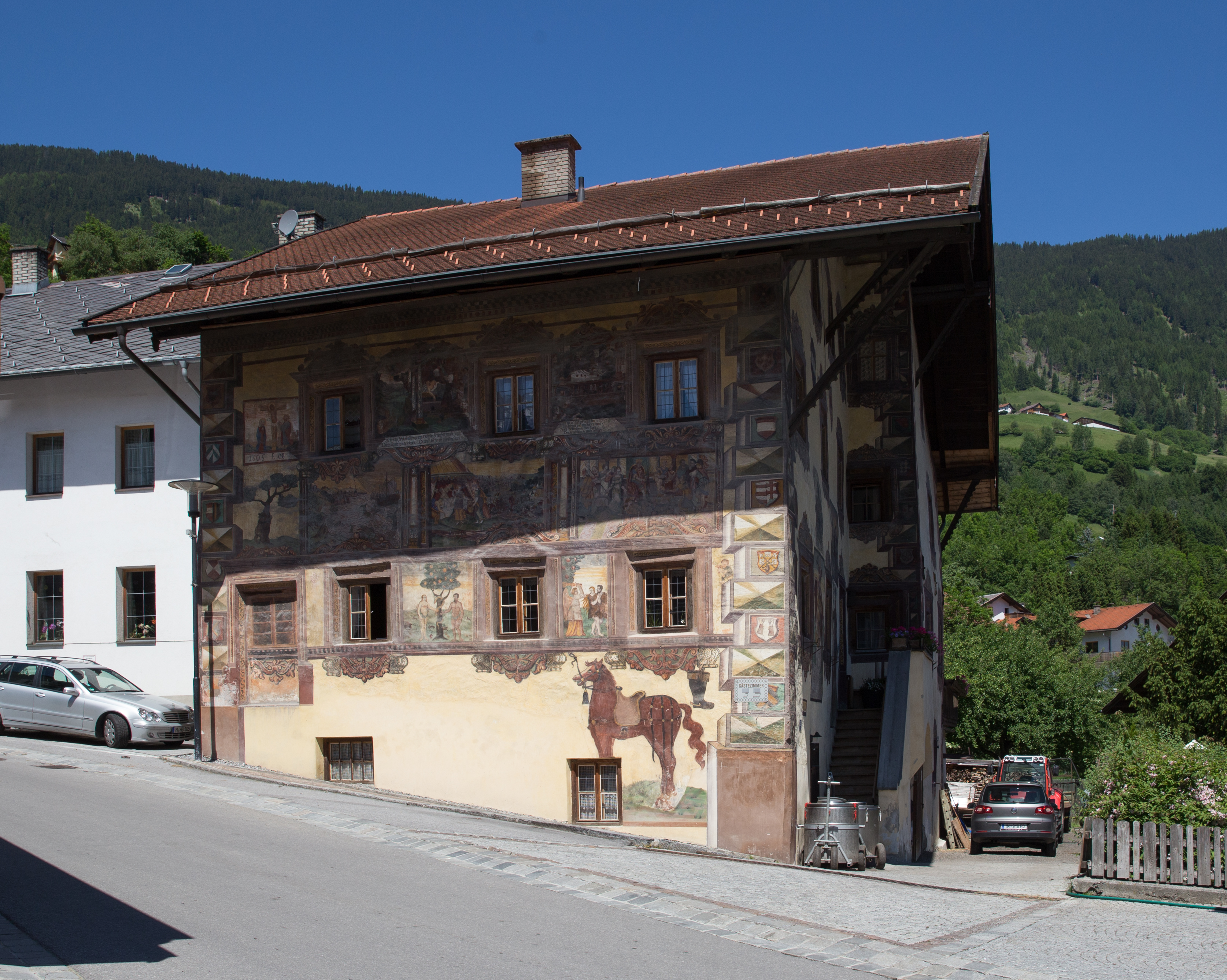 Platzhaus Wenns, Wenns, North Tyrol. Dieses Foto wurde im Rahmen des von Wikimedia Österreich unterstützten ProjektsWiki Takes Nordtiroler Oberland erstellt. The making of this work was supported by Wikimedia Austria. For other files made with the support of Wikimedia Austria, please see the category Supported by Wikimedia Österreich.